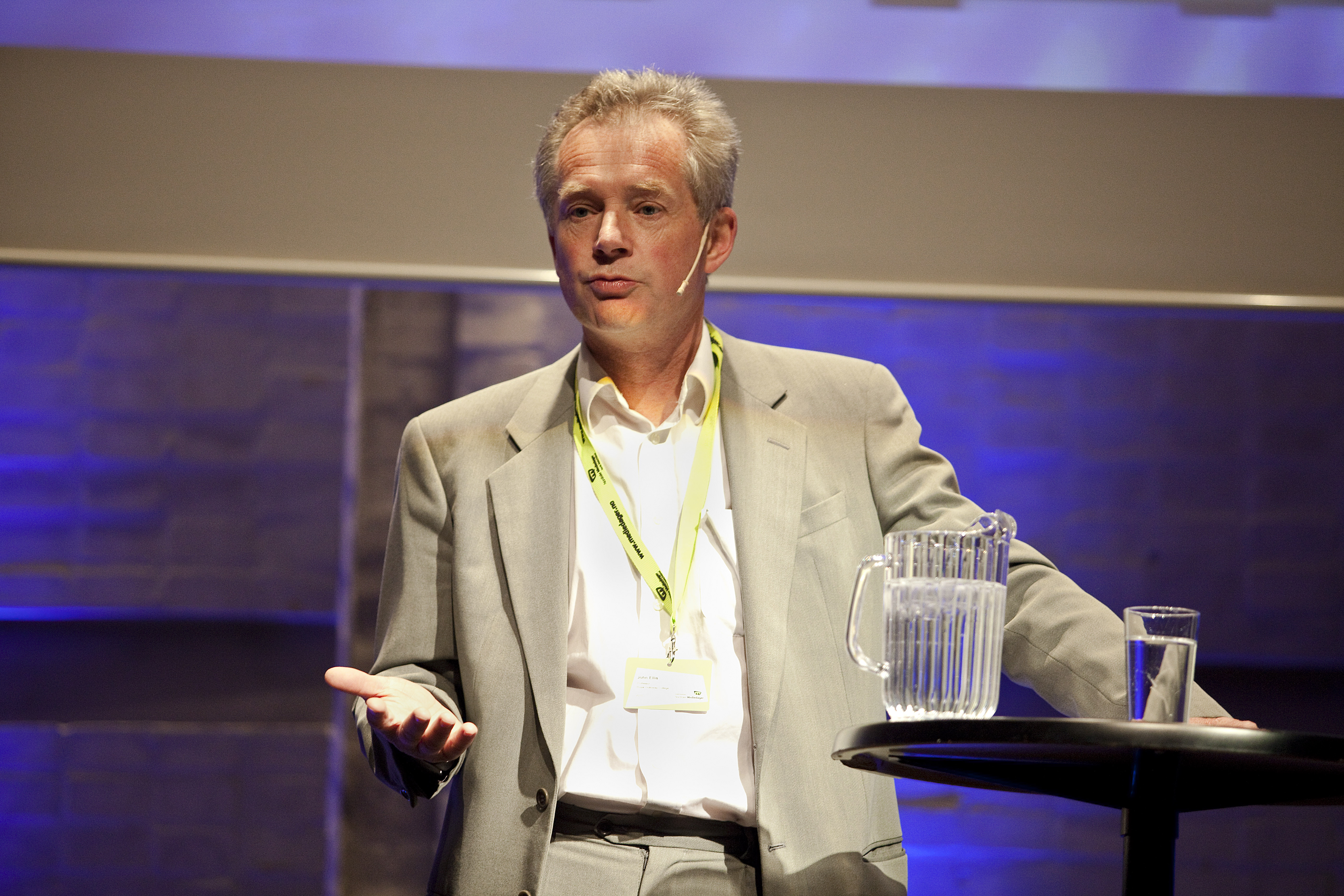 Hva er fjernsyn? FOTO: Jarle H. Moe Hva er fjernsyn? FOTO: Jarle H. Moe